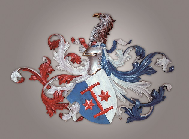 famille von Blankenfeld de Berlin (1200-1900)